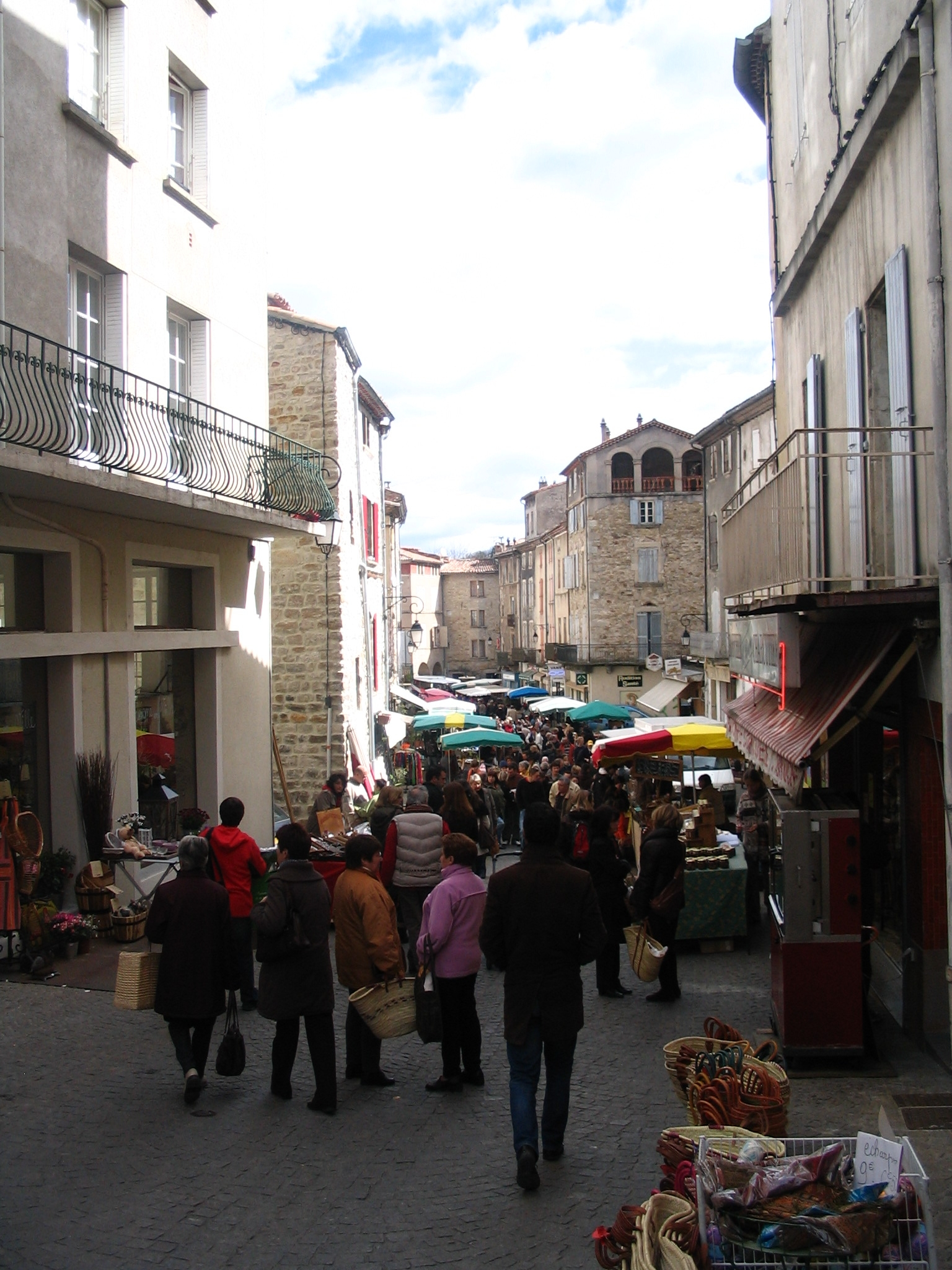 Market place in Les Vans